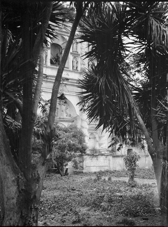 Fachada de las ruinas de San Francisco en Antigua Guatemala en 1913, aproximadamente.